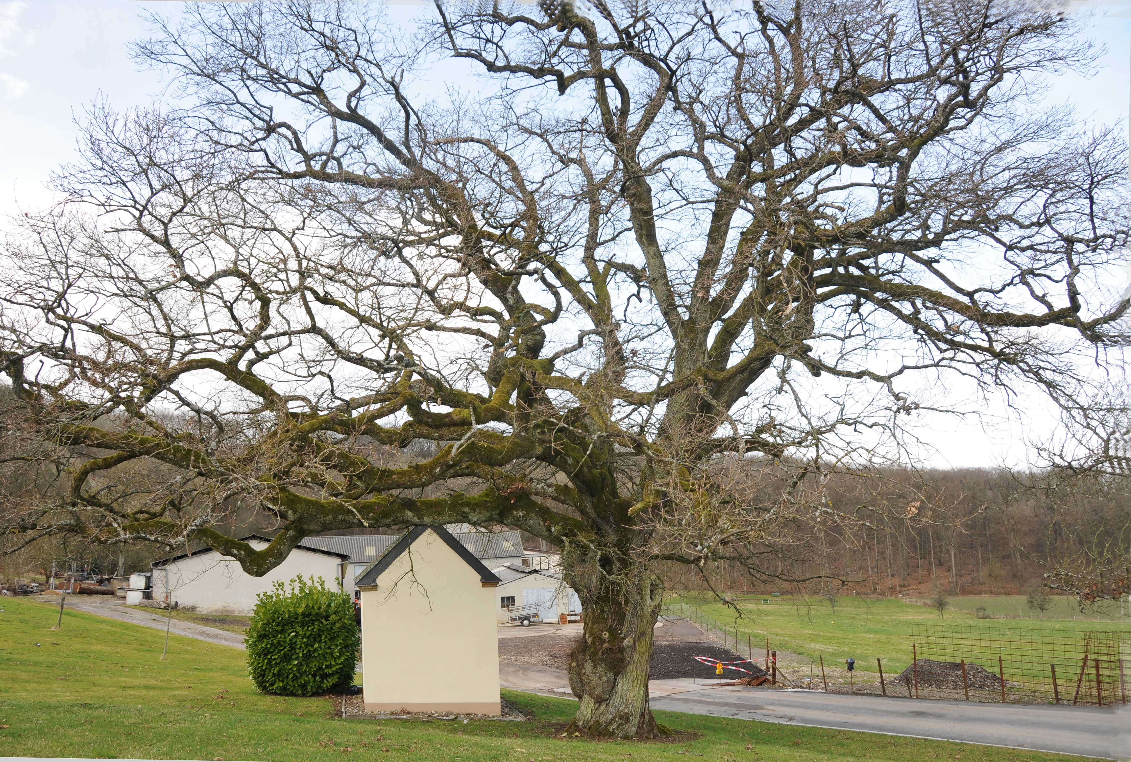 Eech um ENgelshaff.